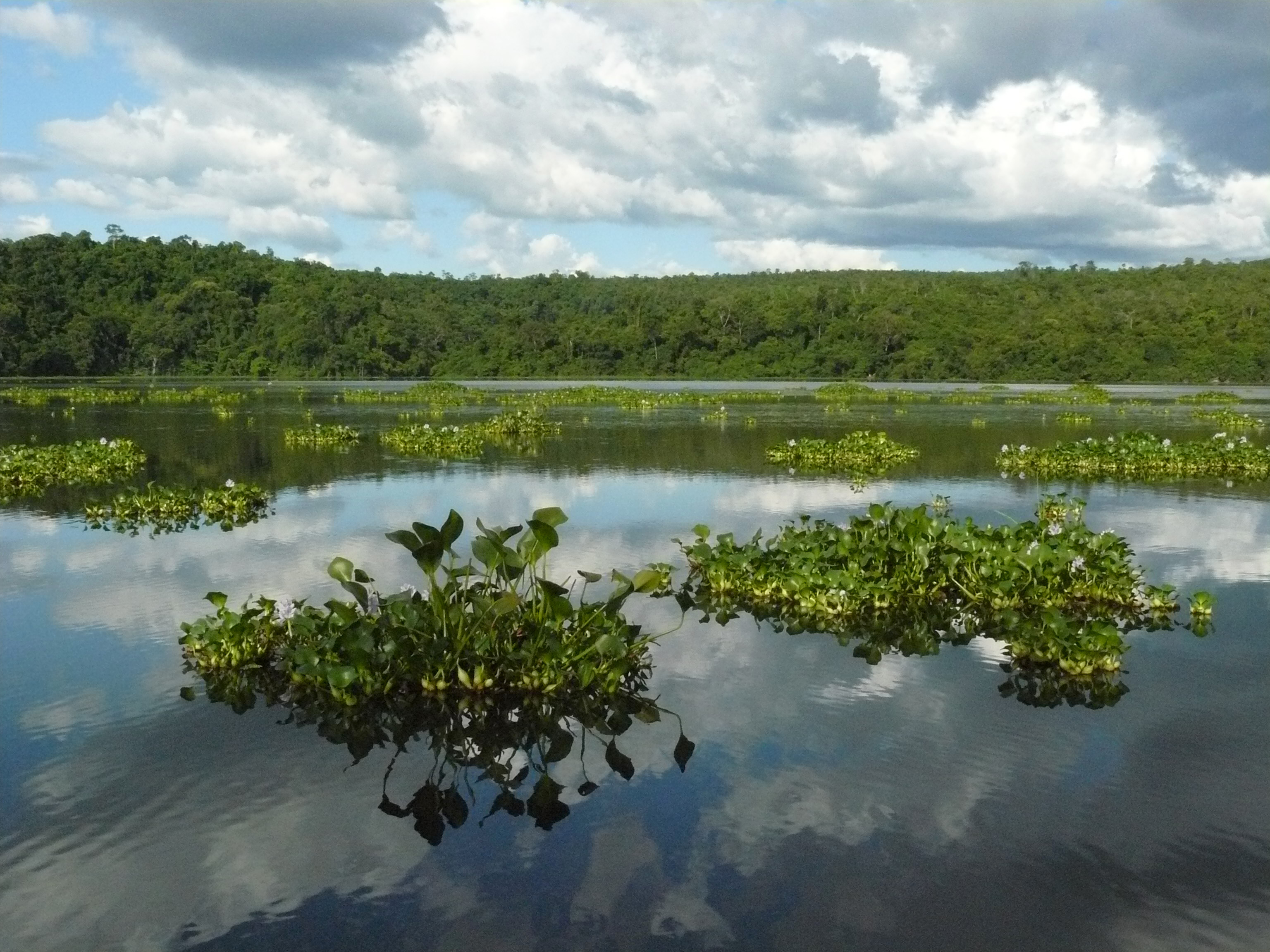 Lake Ravelobe, Ankarafantsika National Park, Madagascar